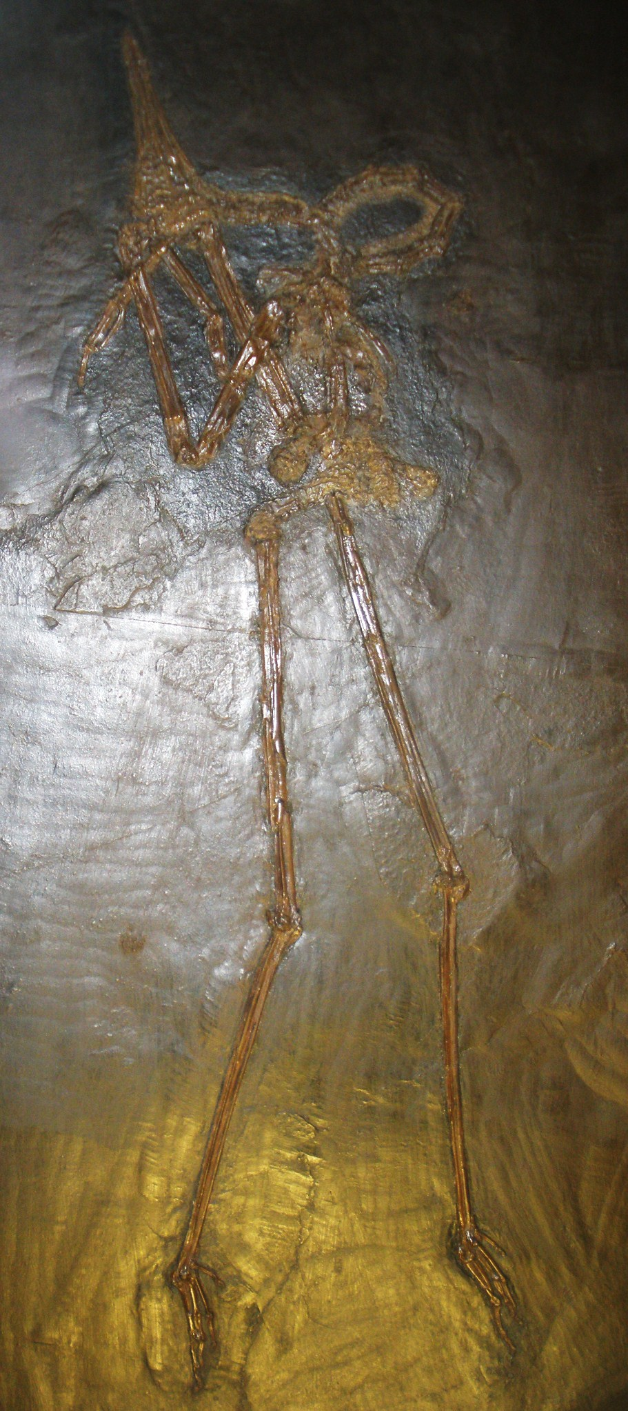 Fossil of Juncitarsus, an extinct bird- Took the photo at Senckenberg Museum of Frankfurt